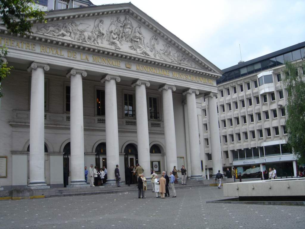 foto gebouw Munt te brussel bron: Serge Bibauw; licentie: CC 2.0